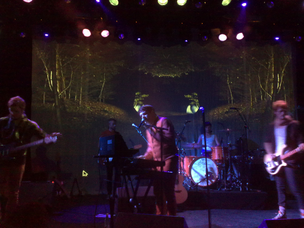 moi Caprice